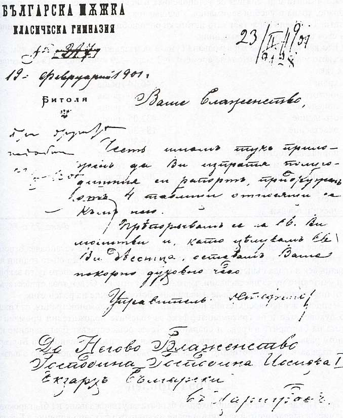 Писмо от Битолската българска гимназия до Екзарх Йосиф І.